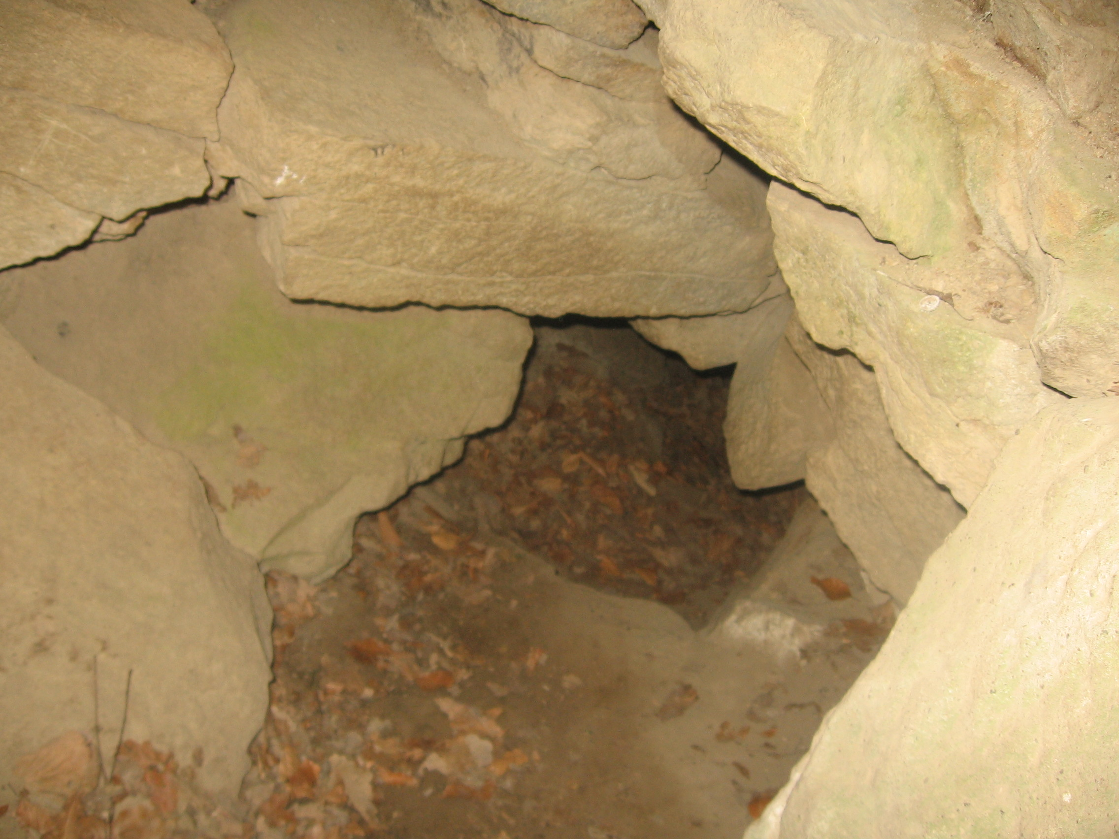 Mysirowa Dziura- jaskinia w Zagórzu